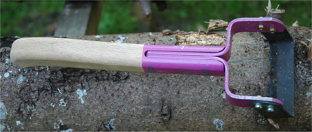 Bügelschaber (Forstwirtschaftliches Gerät)